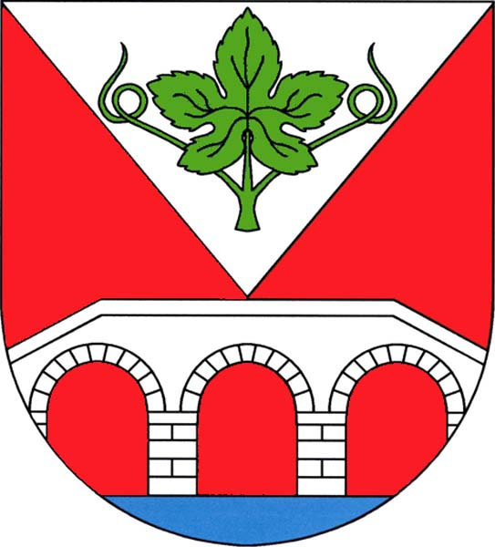 Znak obce Lozice